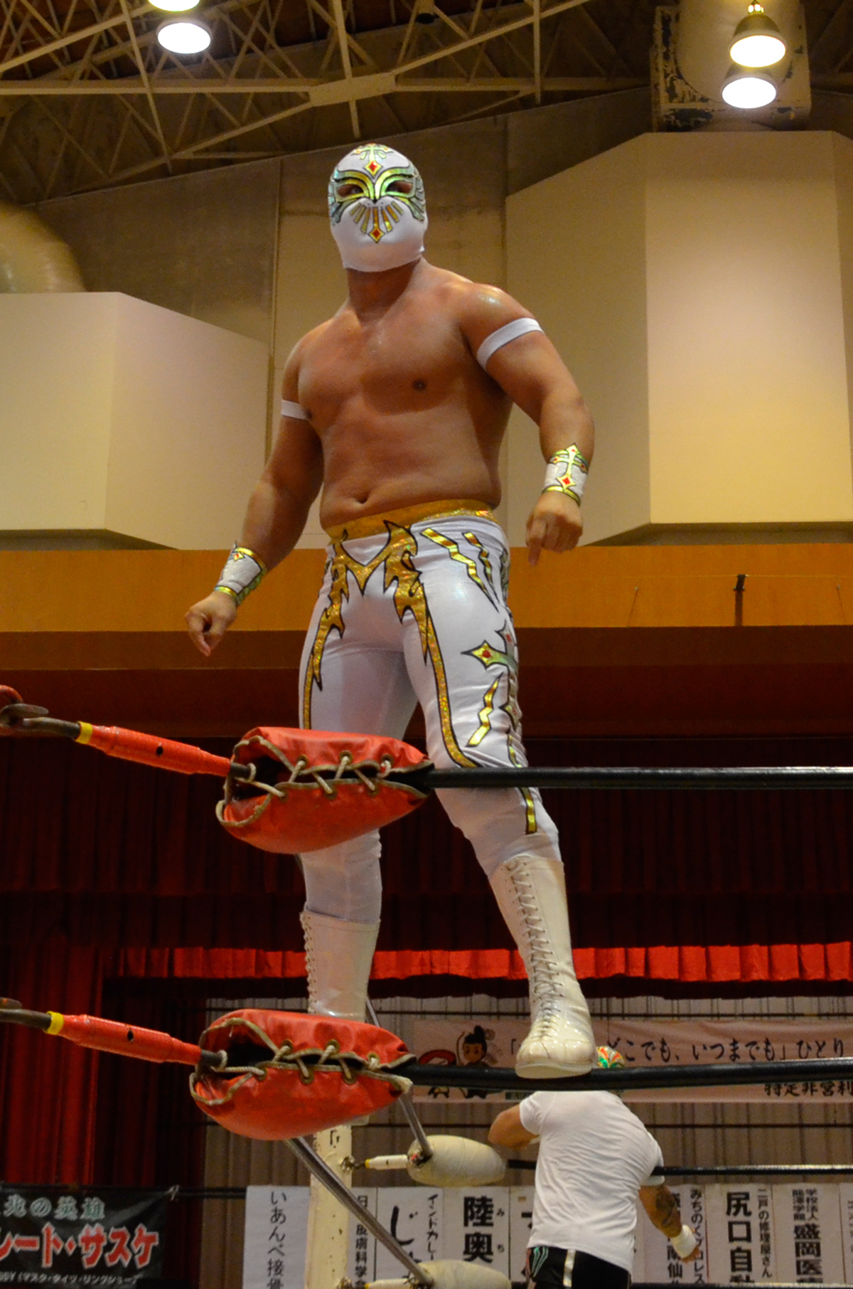 カリスティコ